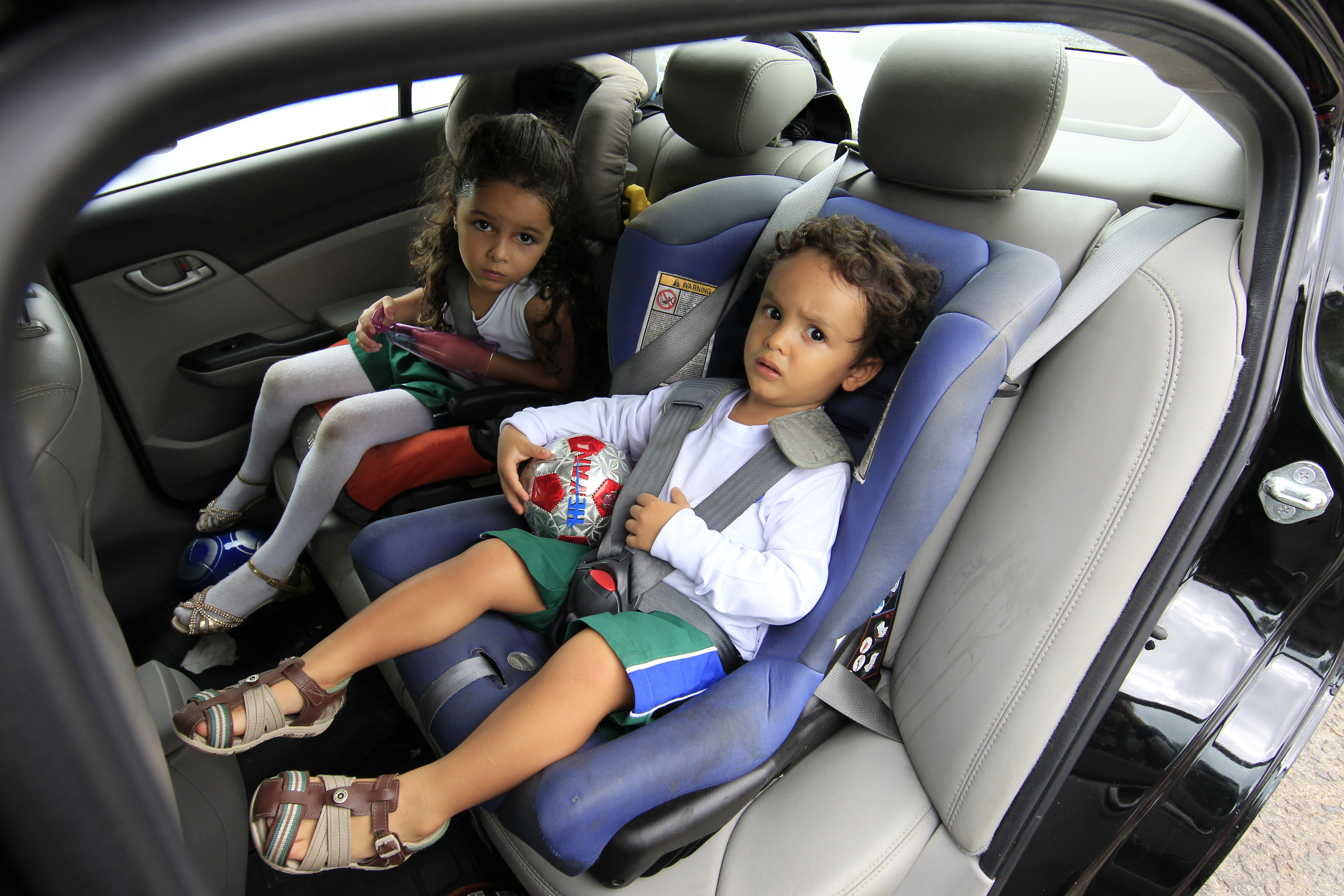 Brasília/DF, 28.10.2015 Crianças são incentivadas pelos seus pais para saber da importância do uso da cadeirinha em automóveis. O uso de cadeirinhas em carros de passeio particulares é obrigatório desde 2010. Com a Resolução 541/2015, o Contran estende a exigência para todo transporte escolar. Foto: Marri Nogueira/Agência Senado